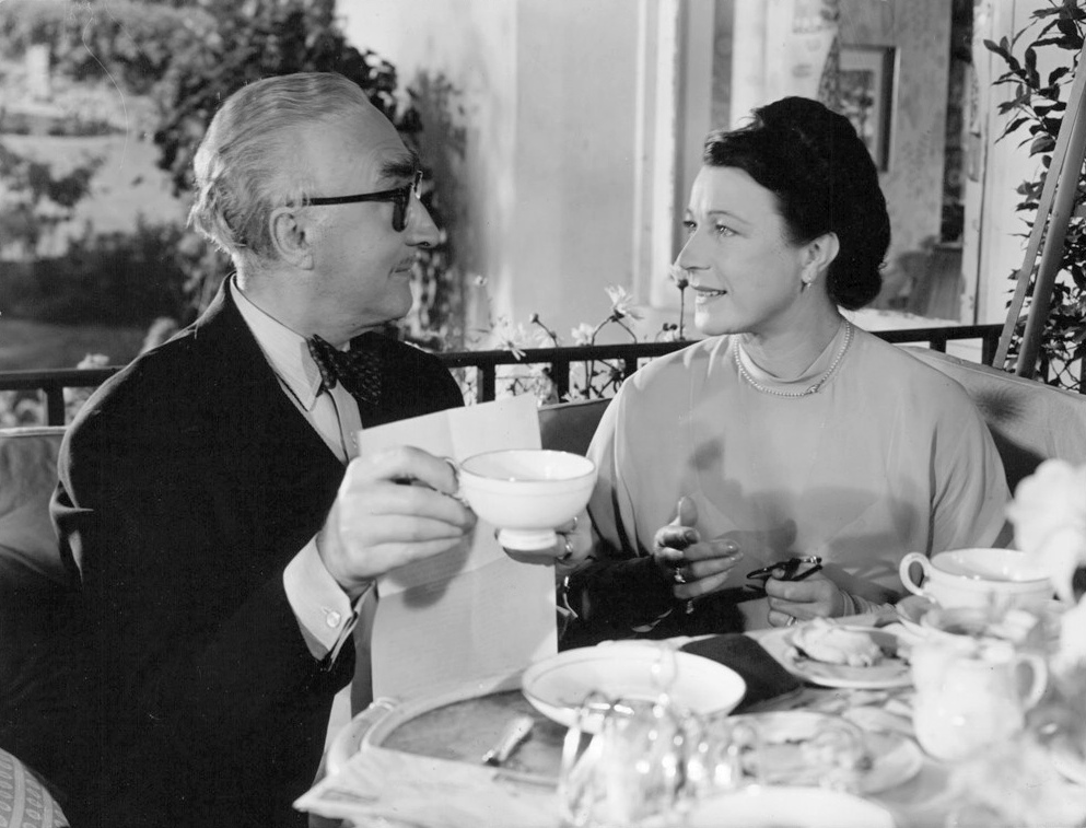 Olof Winnerstrand och Ester Roeck-Hansen i filmen "Kärleken segrar".